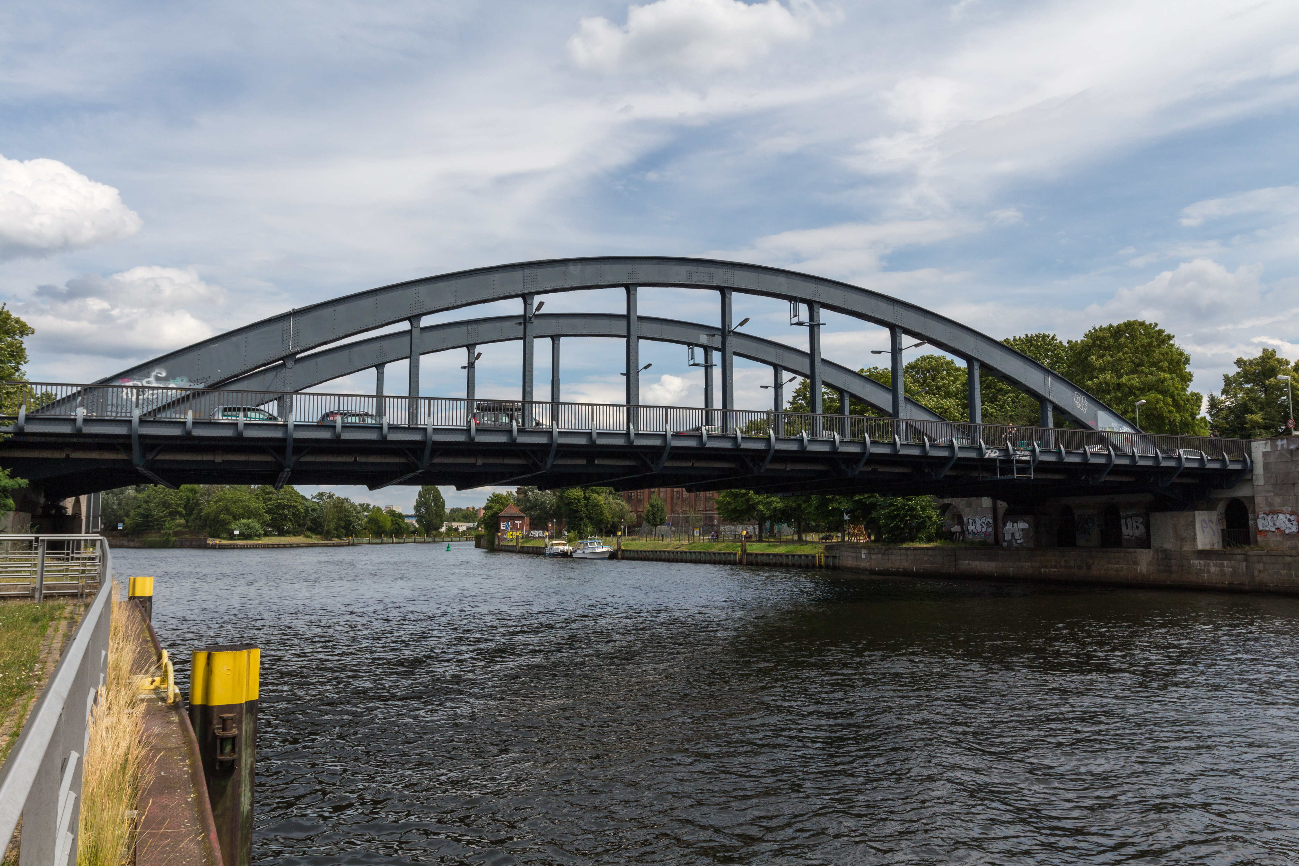 Charlottenbrücke über die Havel in Berlin-Spandau.